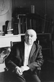 Portrait photographique de Jean Grenier réalisé en 1964 par Joël Minois à Bourg-La-Reine